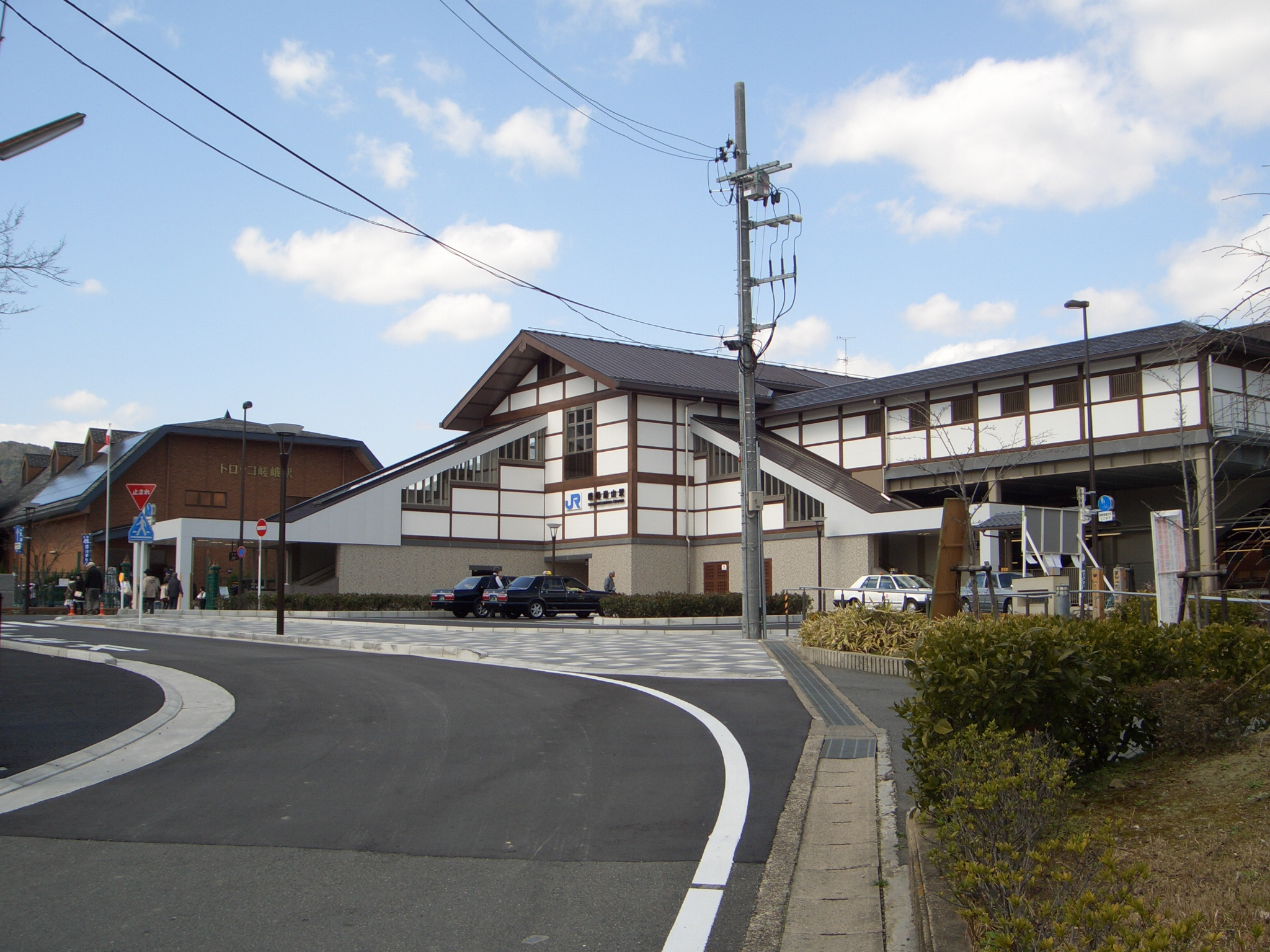 西日本旅客鉄道山陰本線（嵯峨野線）嵯峨嵐山駅 南口。京都市右京区。